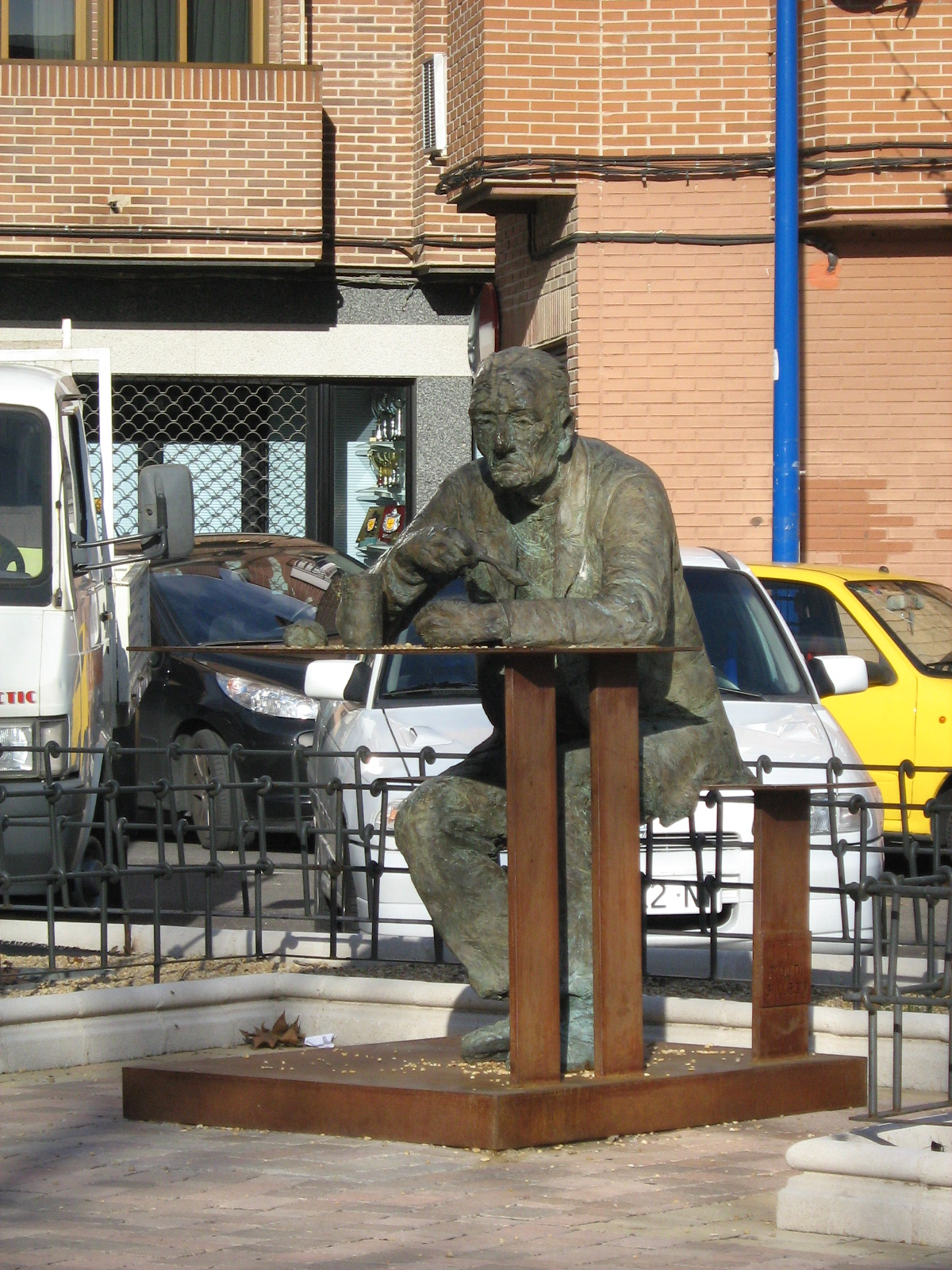 Estatua en homenaje del comedor benéfio Paquita Gallego, situada en el bulevar homónimo. Autor: José Luis Casanova